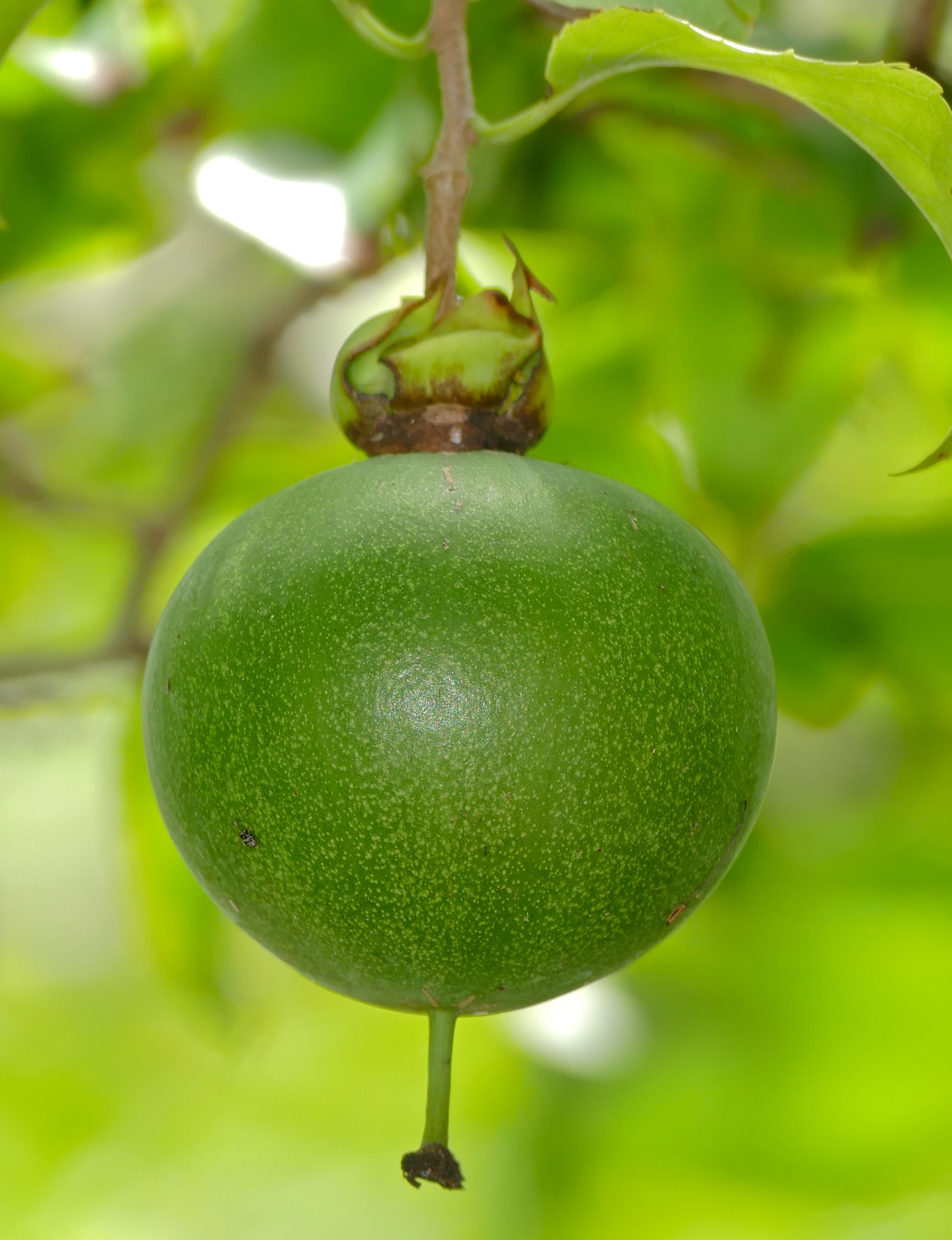 Lower Sabie Camp, Kruger NP, SOUTH AFRICA